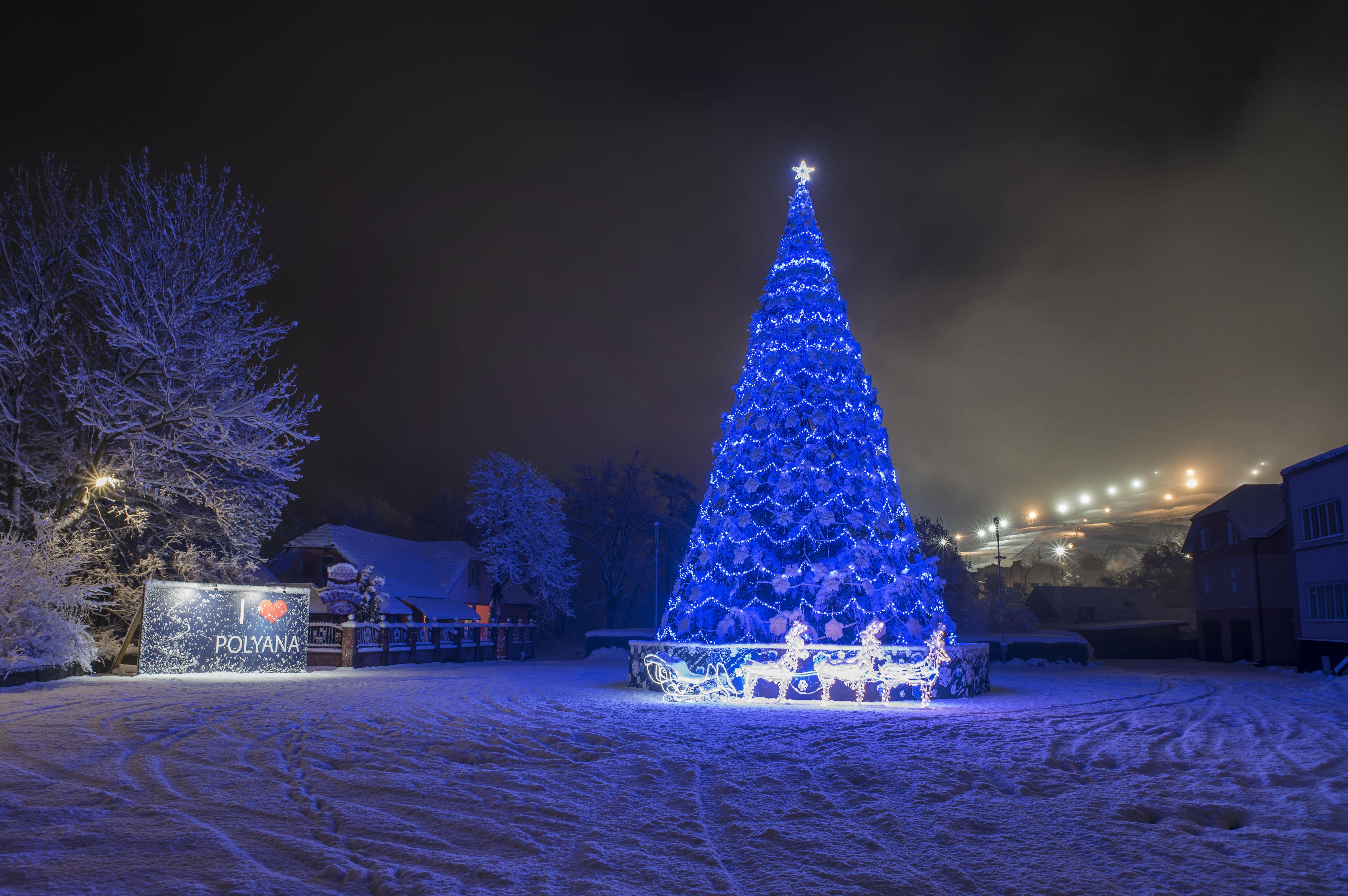 Полянська ОТГ. Новорічна ялинка 2018